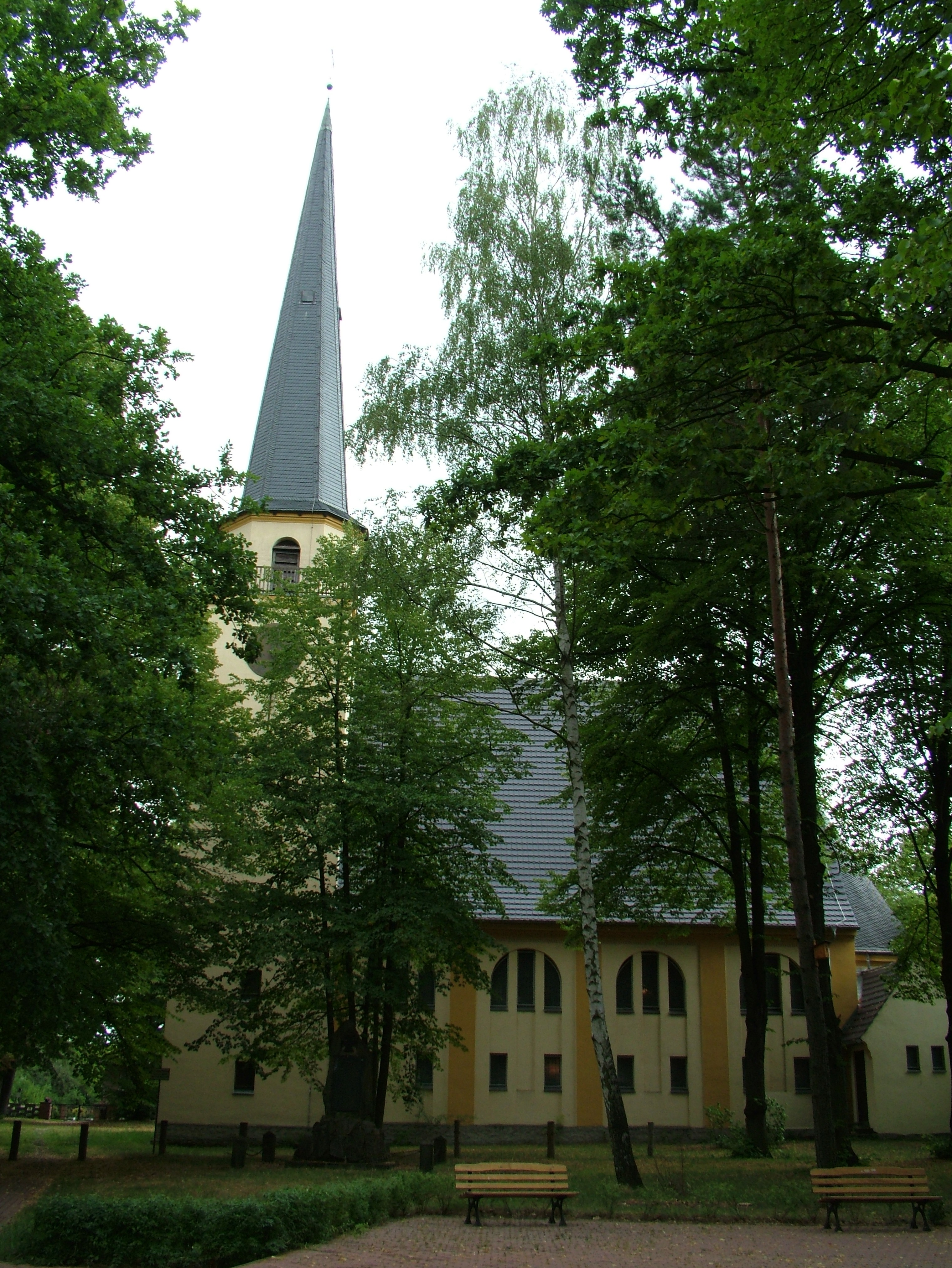 Groß Köris, Brandenburg, die evangelische Kirche